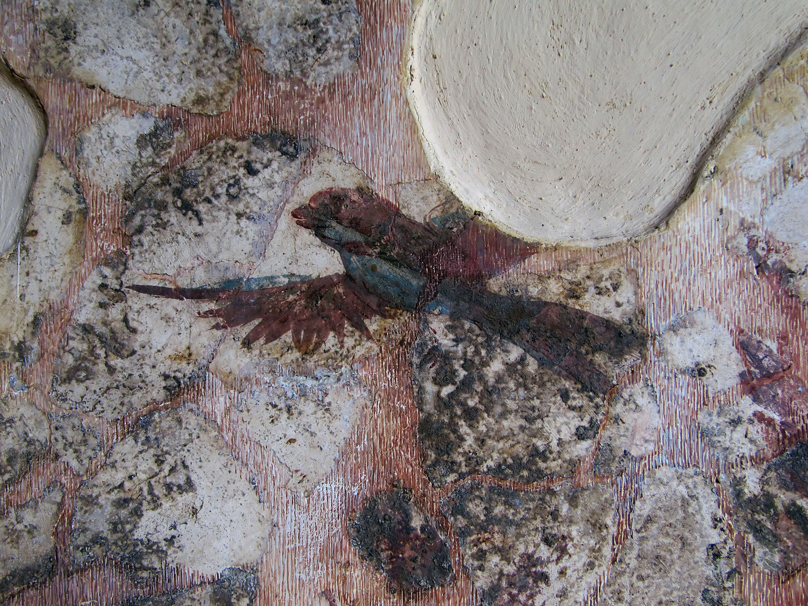 római villagazdaság romjai (Nemesvámos, BALÁCAPUSZTA, LIKASDOMB) This is a photo of a monument in Hungary, Identifier: 15525